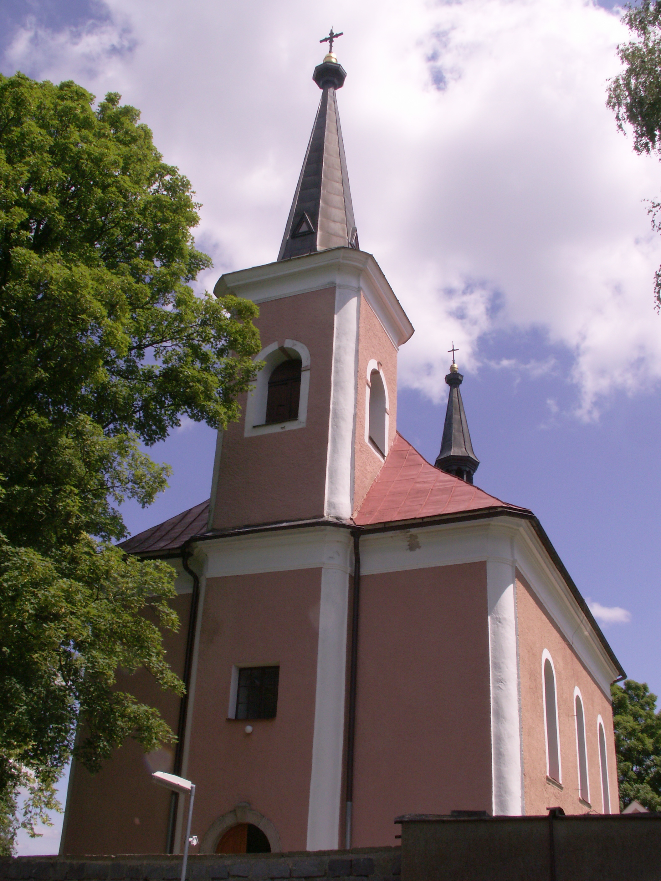 Herálec (okres Žďár nad Sázavou) - kostel svaté Kateřiny